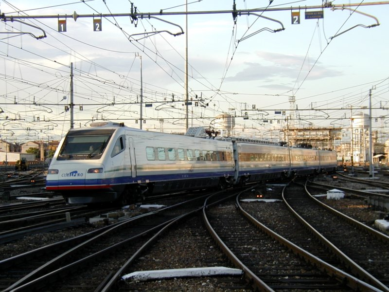 Cisalpino-AG ETR 470-002 entering to Milano-Centrale travelling from Zürich-HB